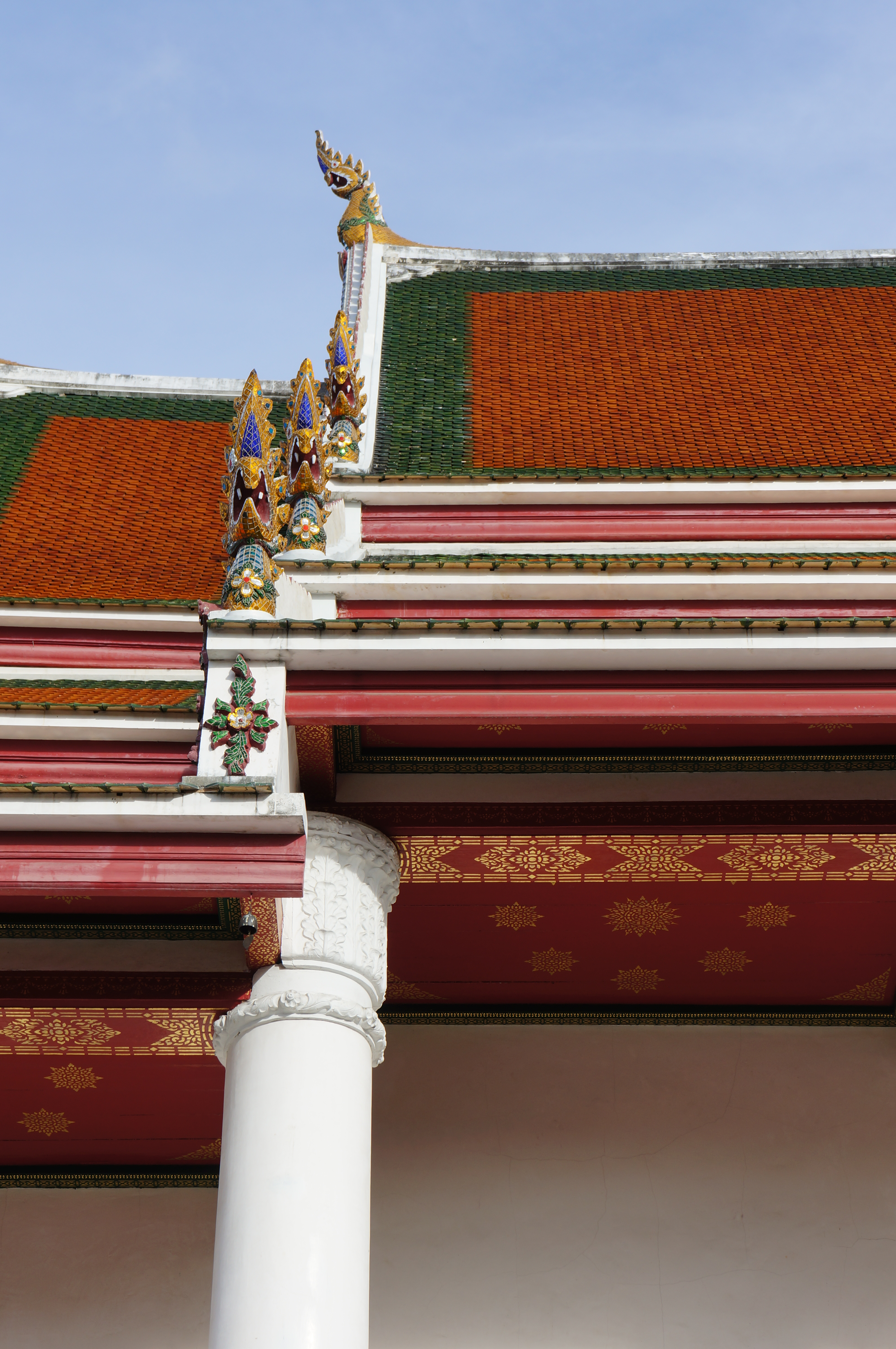 ตามแผนผังพื้นที่ตั้งวัดโดยสังเขปที่แนบมานี้ประวัติการสร้างวัดพื้นที่ตั้งวัดเป็นที่ราบลุ่มอาคารและเสนาสนะมีอุโบสถหลังเก่าสร้างในสมัยกรุงศรีอยุธยาตอนปลายราวพ.ศ.๒๓๐๐ไม่ปรากฏนามผู้สร้างสร้างด้วยการก่ออิฐฉาบปูนเรียบหลังคาชั้นเดียวมุงหลังคาด้วยกระเบื้องเกล็ดปลาซีเมนต์โครงหลังคาทำด้วยไม้สัก หน้าบันทำด้วยไม้สักไม่มีลายแบบตีชิดกัน ช่อฟ้าใบระกา หางหงปูนปั้น บัวปลายเสา คันทวย ทำแบบปูนปั้น บานประตูและหน้าต่างทำด้วยไม้สักแบบ โบราณบานละ๒ ข้างแบบมีอกเลา ไม่มีลายด้านหน้าอุโบสถมีเพิงลาดลง มีขนาด กว้าง ๑๐.๐๐ ม. ยาว ๒๑ ม. สูง ๑๒.๐๐ม.มีพระประธานอยู่ในอุโบสถสมัยอู่ทองหน้าหนุ่ม ปางสมาธิทำด้วยศิลาแลงไม่มีหลักฐานบ่งบอกว่าได้รับพระราชทานวิสุงคามสีมาครั้งแรกเมื่อใดบัดนี้ได้กลายเป็นวิหารโดยปริยายสำหรับอุโบสถหลังใหม่แบบจัตุรมุขกว้าง ๐๘.๐๐ เมตร ยาว ๒๙.๐๐ ม.หลังคาซ้อนกัน ๓ ชั้นเริ่มสร้างเมื่อ๒๕๑๘สร้าง พ.ศ. ๒๕๑๕ กุฏิสงฆ์มีจำนวน ๖ หลังหอสวดมนต์ทรงไทยโบราณหนึ่งหลัง กว้าง ๐๔.๕๐ ม. ยาว ๒๑.๐๐ ม.สร้างพ.ศ.๒๕๐๐ดำเนินการสร้างโดยหลวงพ่อเจ้าอาวาสรูปปัจจุบันคือ พระครูวิจิตรพัฒนาภรณสำหรับพระประธานปางสมาธินั้นเมื่อสร้างอุโสถหลังใหม่เสร็จแล้วหลวงพ่อเจ้าอาวาสได้อัญเชิญไปประดิษฐานที่อุโบสถจุตุรมุขหลังใหม่จนถึงปัจจุบัน วัดดอกไม้ สร้างในสมัยอยุธยาตอนปลายประมาณพ.ศ.๒๓๐๐ ไม่ทราบนามและประวัติผู้สร้าง นามวัดอาจบ่งบอกถึงนามผู้สร้างหรือไม่ก็บ่งบอกภูมิประเทศที่ตั้งวัด ซึ่งแต่เดิมเป็นสวนมาก่อนวัดดอกไม้ได้รับพระราชทานวิสุงคามสีมาครั้งหลังเมื่อ วันที่ ๒๓ มิถุนายนพ.ศ.๒๕๑๔